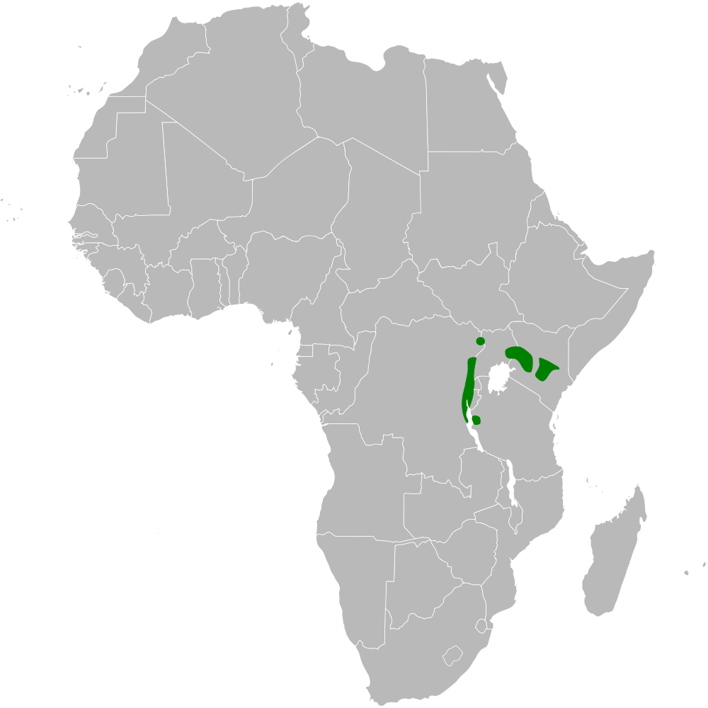 Sylvietta leucophrys distribution map, based on